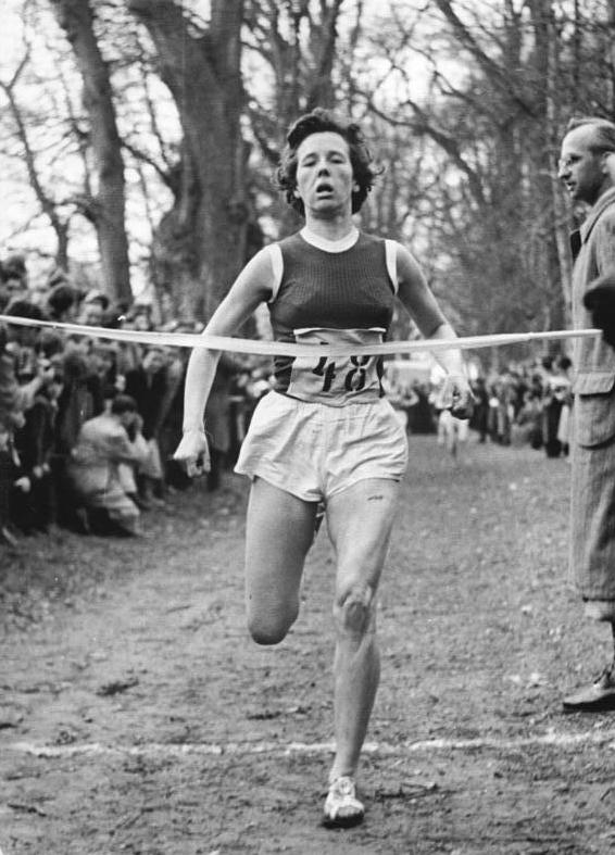 Ursula Donath Zentralbild TBD-Wlocka 3 Motive 18.4.1955 -2913- DDR-Waldlaufmeisterschaften 1955. Am 17. April 1955 wurden im Wobicht von Weimar die DDR-Waldlaufmeisterschaften 1955 mit starker Beteiligung ausgetragen. Ursula Donath vom SC Chemie Halle-Leuna wurde DDR-Meisterin der Frauen im Waldlauf über 1.000 m. Ihre Zeit betrug 3:12,9 Min. UBz: Ursula Donath am Ziel.